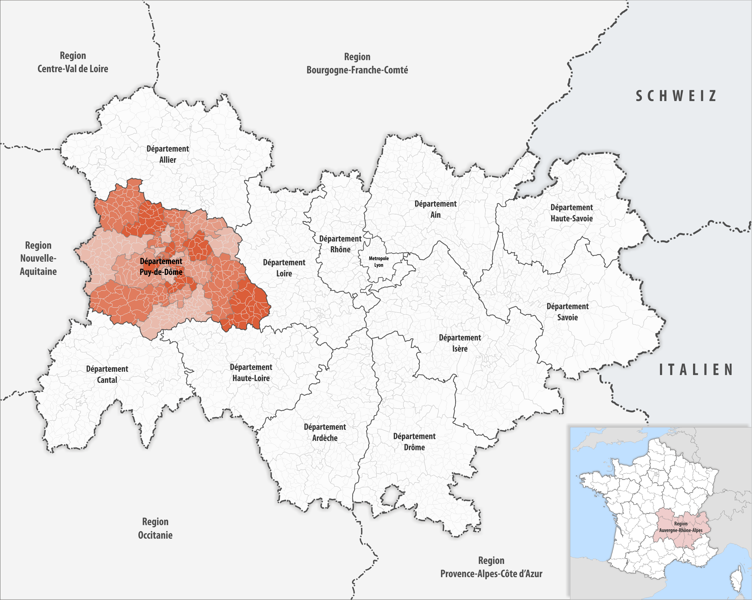 Lage des Departements Puy-de-Dôme